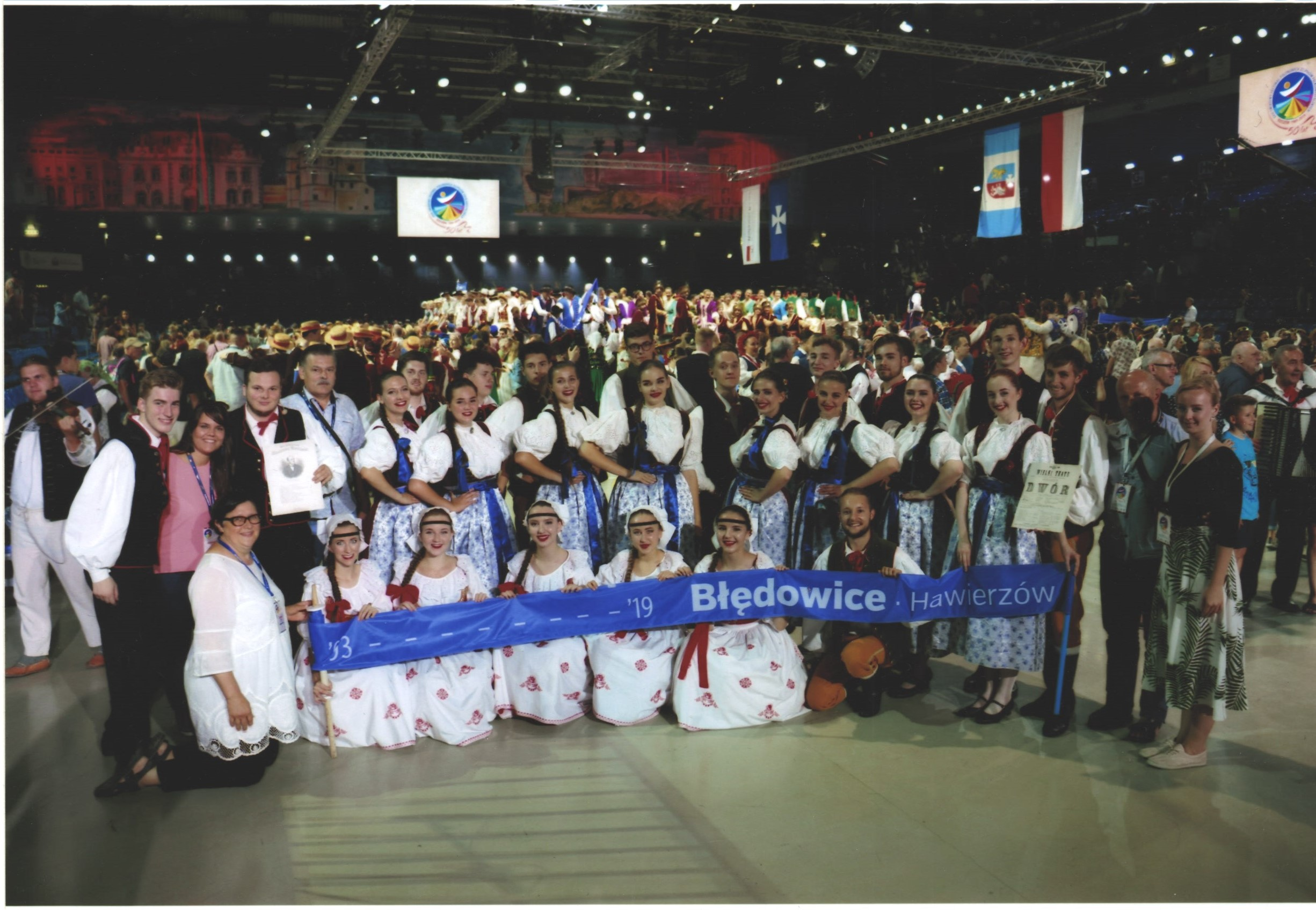 ZR Błędowice na festiwalu folklorystycznym w Rzeszowie